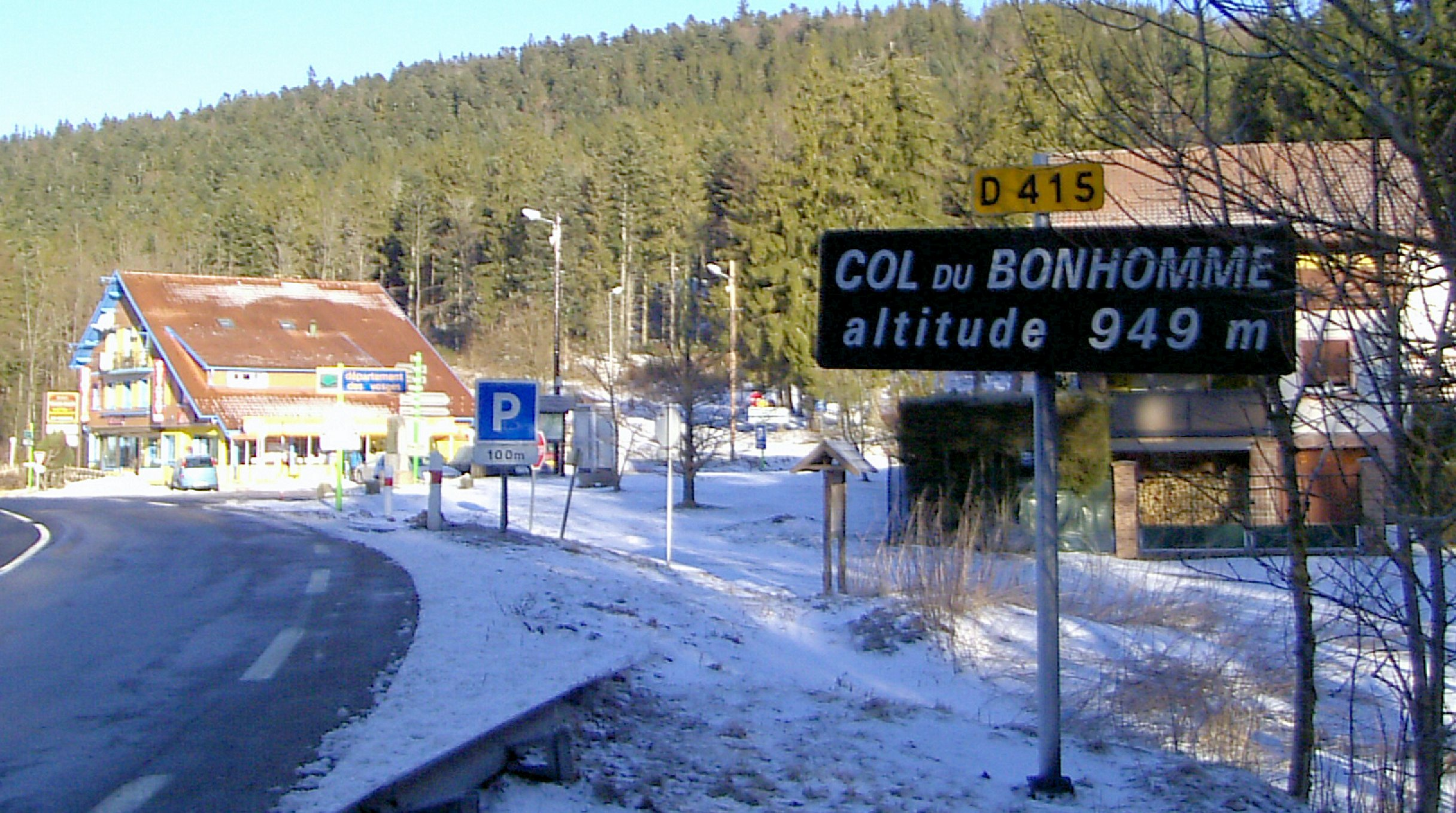 Col du Bonhomme en hiver